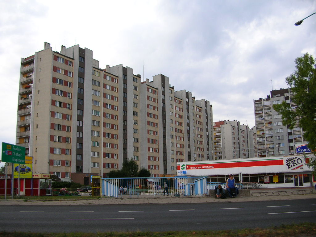 Opole - Zaodrze Autor : Bartek Wawraszko ( Bast )